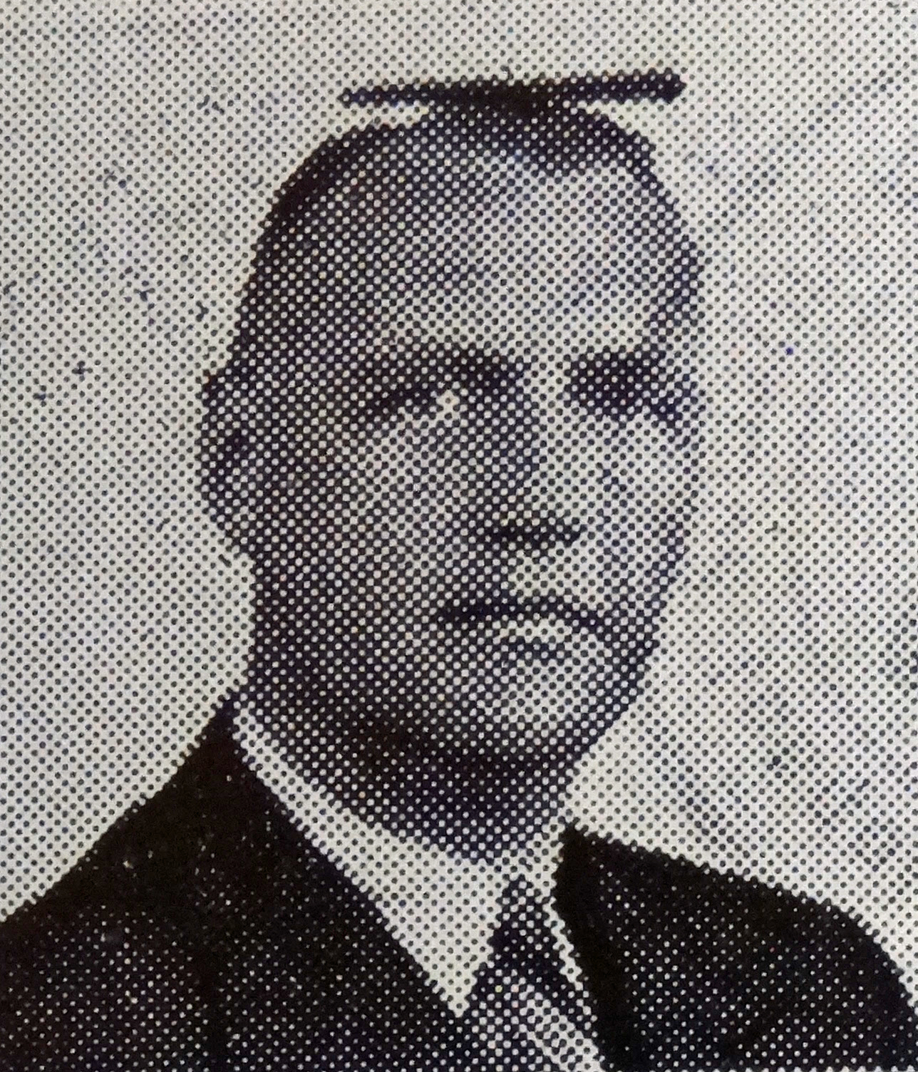 Pasfoto van burgemeester en NSB'er Fransema (1893-1975) op inschrijfkaart N.S.B.